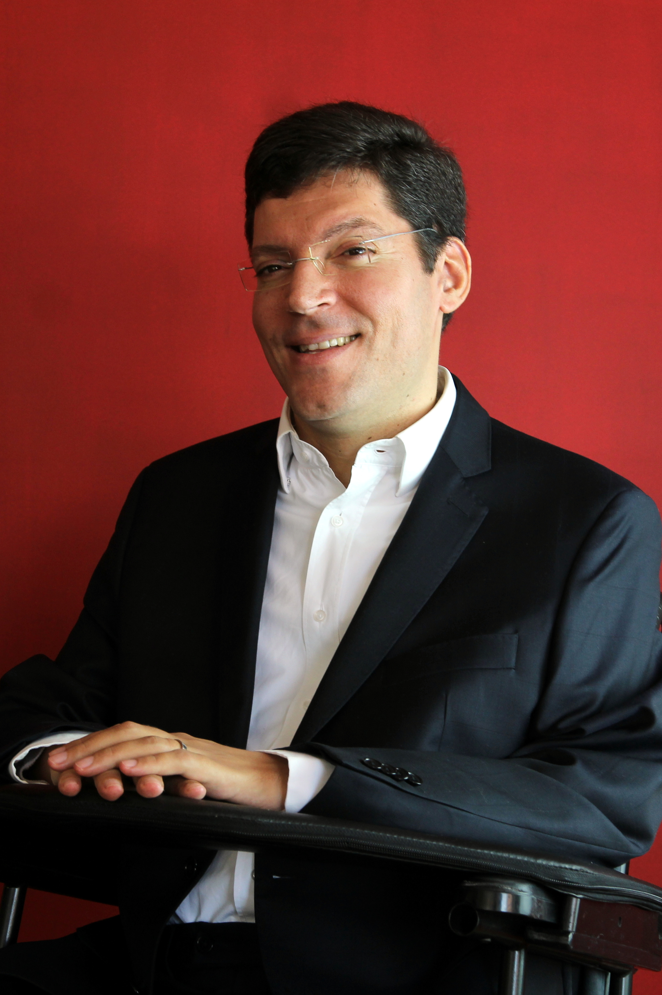 Retrato de Rodrigo Hübner Mendes, superintendente do Instituto Rodrigo Mendes, de perfil, em fundo vermelho.